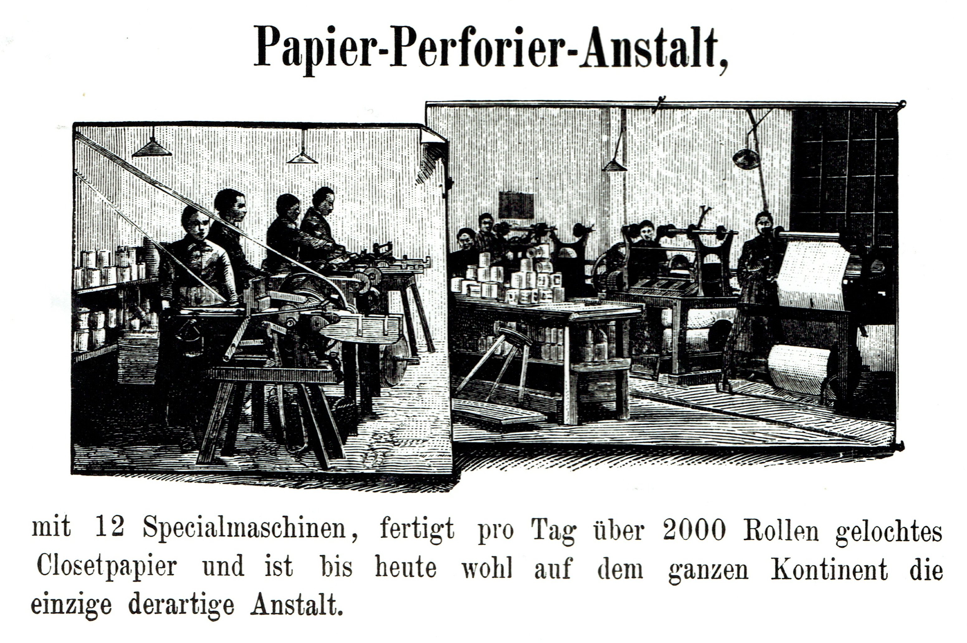 Eisenwerke Gaggenau A.G., 1891, Broschüre von Theodor Bergmann. Seite 9: Ausschnitt Papier-Perforier-Anstalt